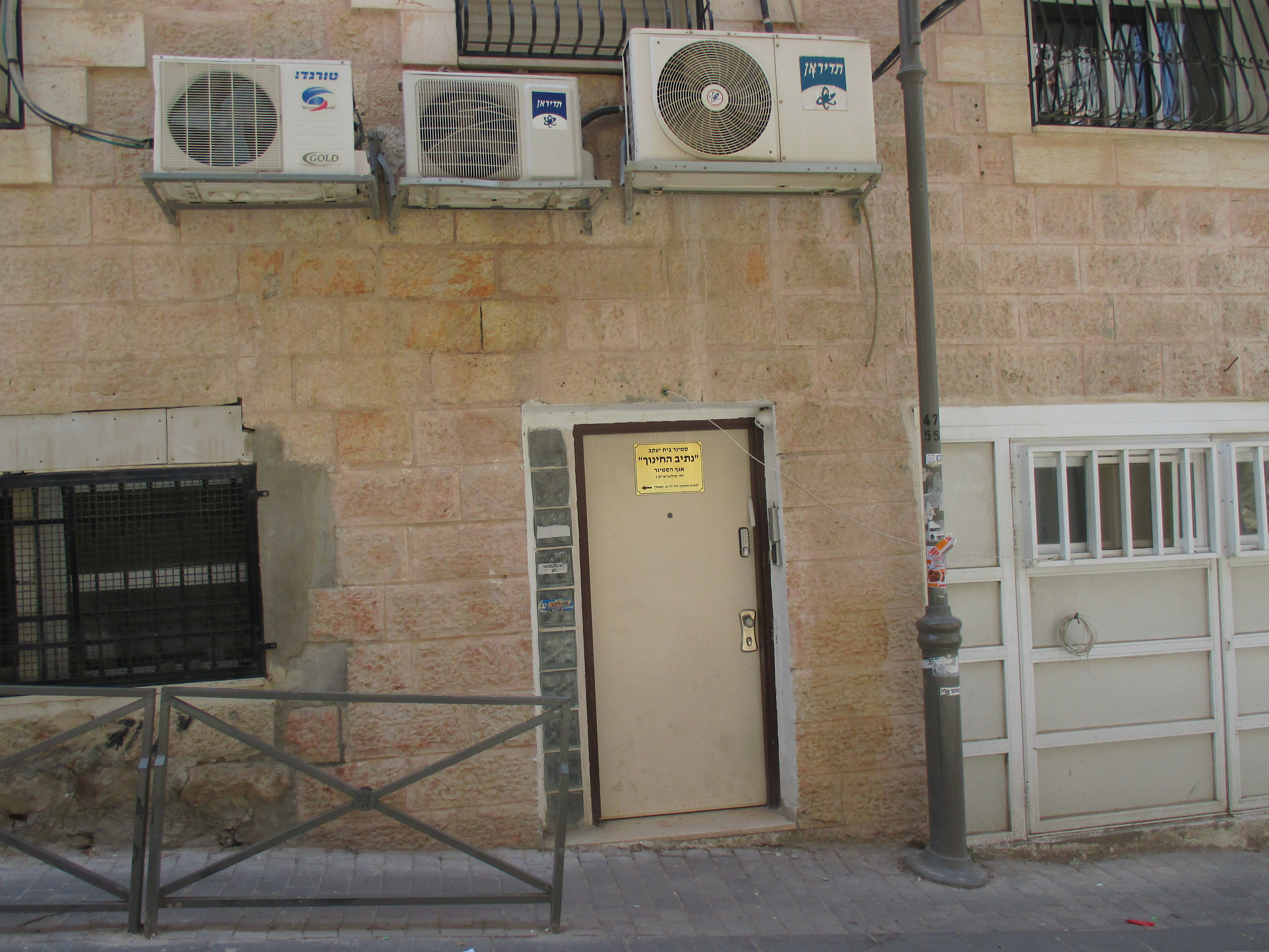 מבנה סמינר נתיב החינוך בירושלים